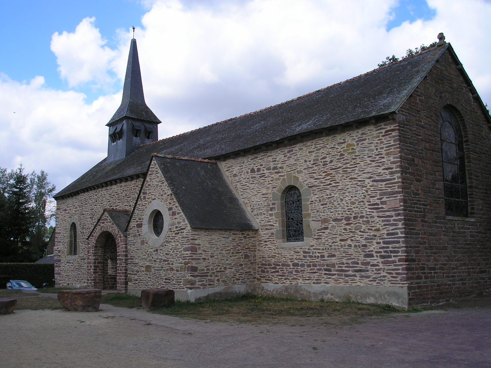 L'église de Tréhorenteuc, Forêt de Brocéliande.